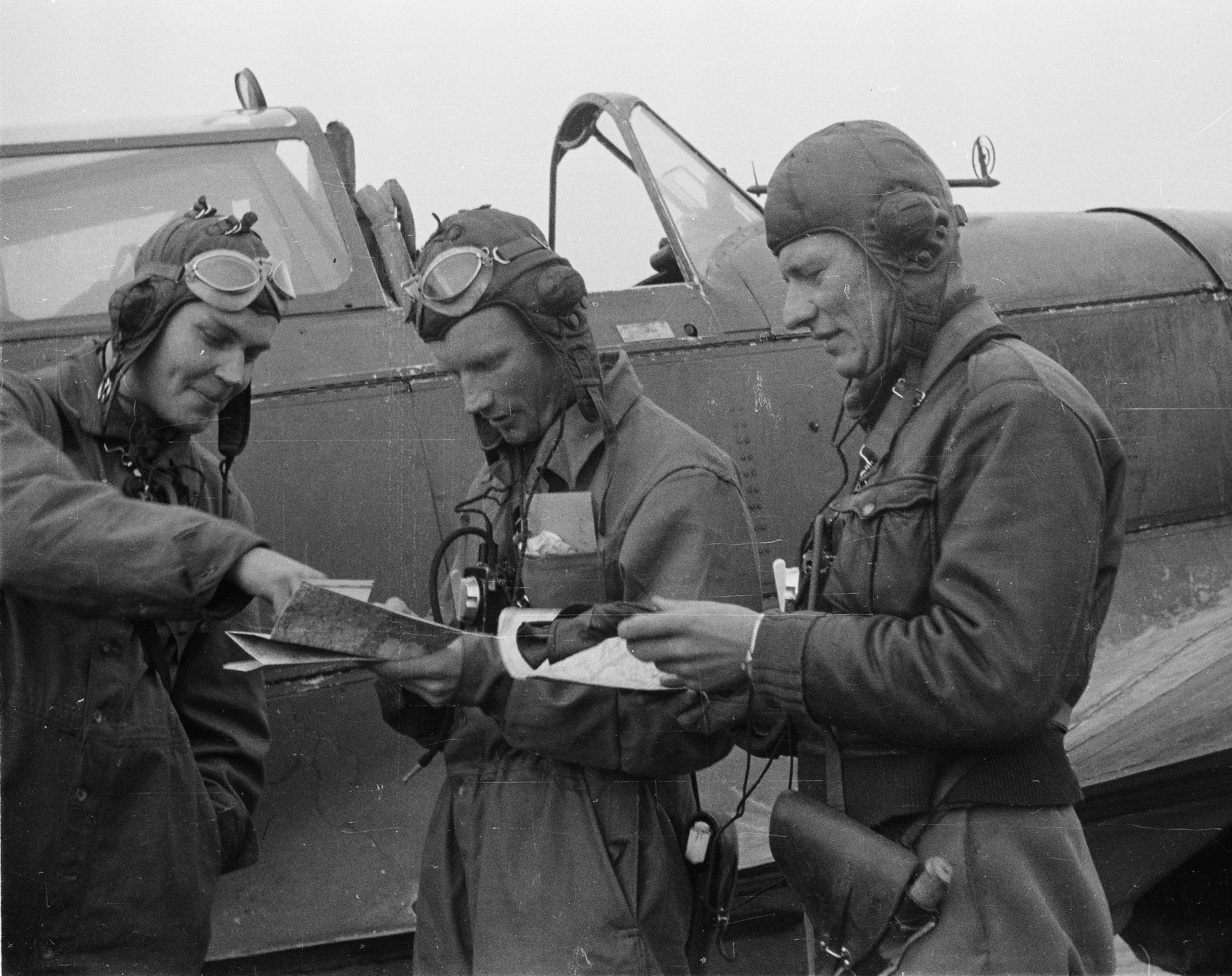 Hävittäjälentolaivue 28:n ohjaajia: Vasemmalta luutnantti Kalle Uola, kapteeni Reino Turkki ja vääpeli Uuno Karhumäki.